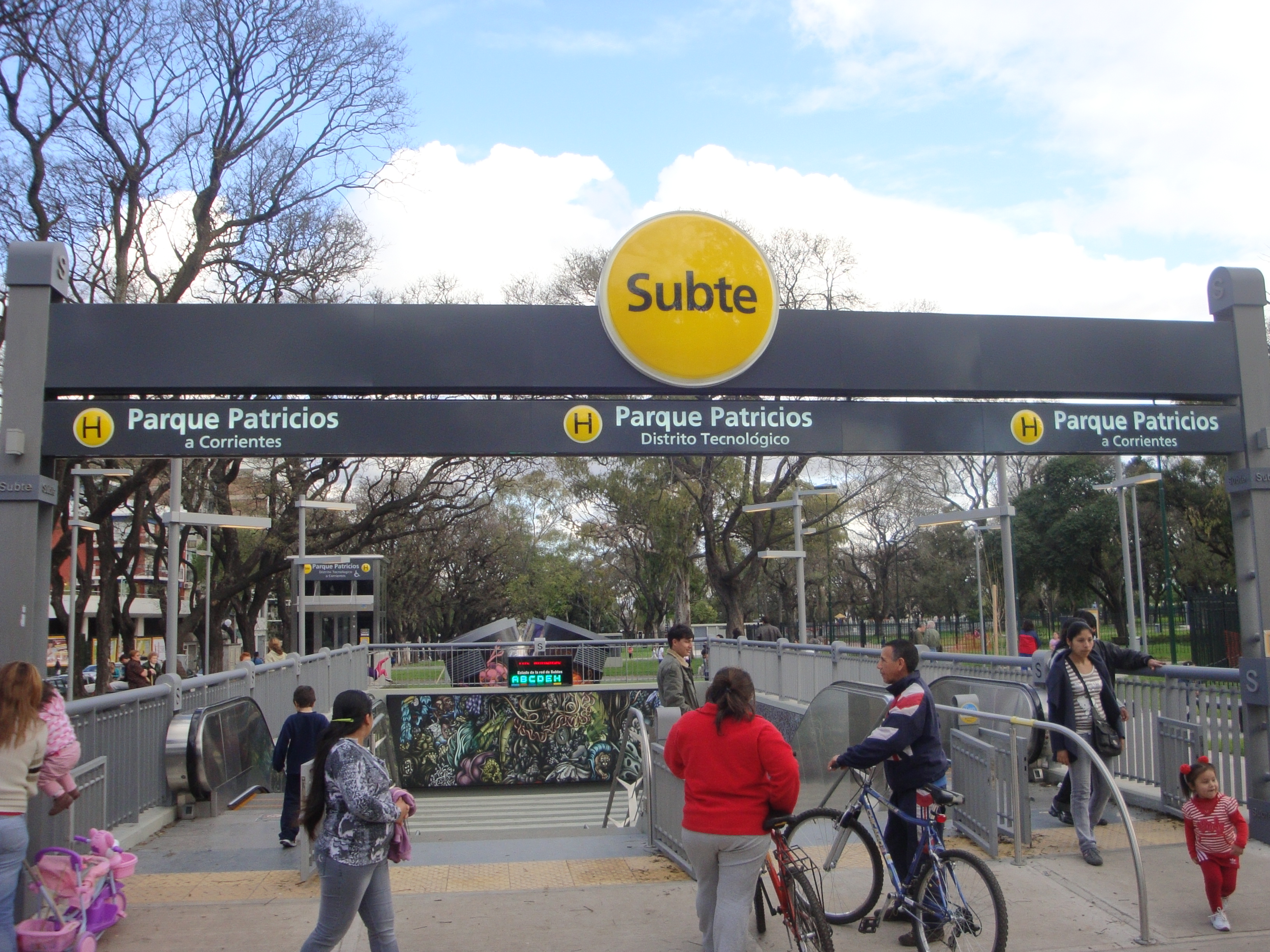 Entrada a la estación Parque Patricios de la línea H del Subte de Buenos Aires.